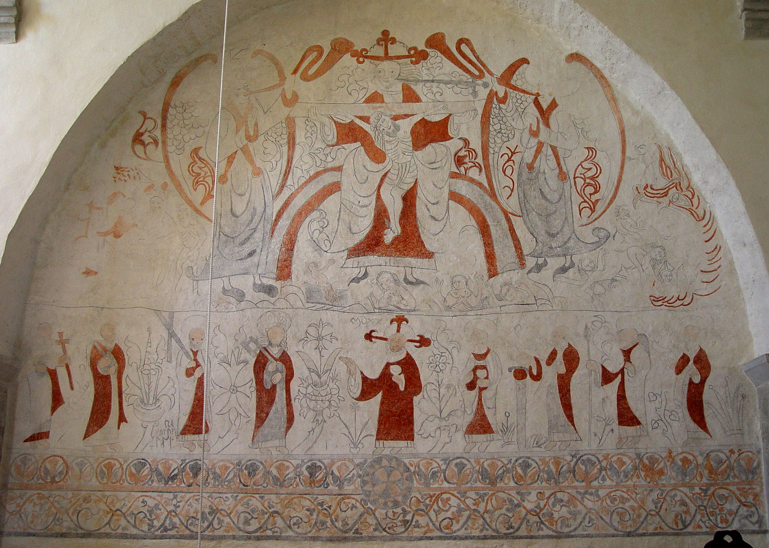 Lau kyrka auf Gotland. Das Jüngste Gericht, 1520